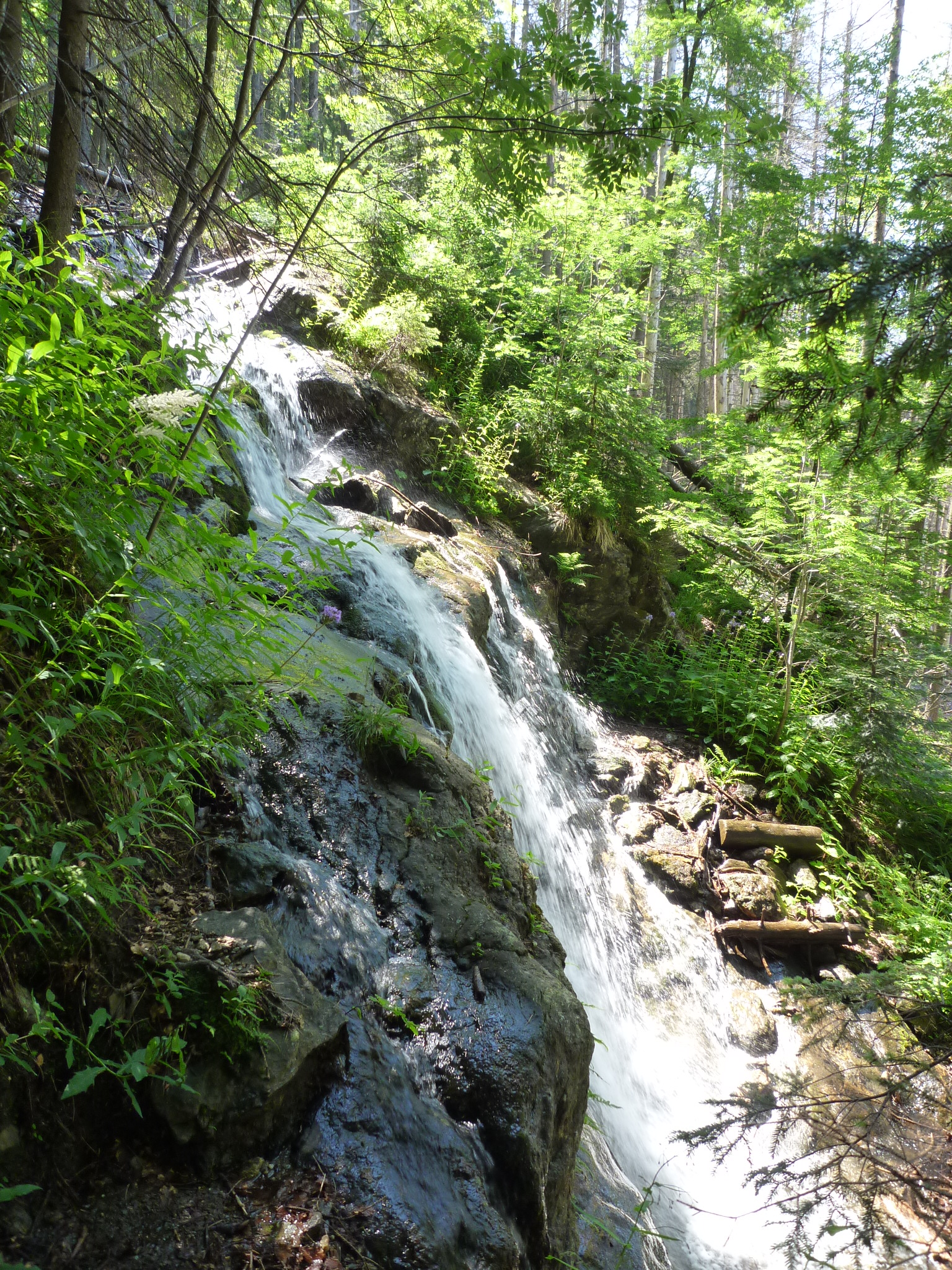 Die Steinbachfälle erreicht man auf dem Wanderweg vom Zwieseler Waldhaus in Richtung Kleiner bzw. Großer Falkenstein, genannt Steinbachweg.